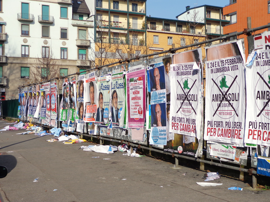 Milano, viale Campania. Manifesti di propaganda per le elezioni politiche e regionali.